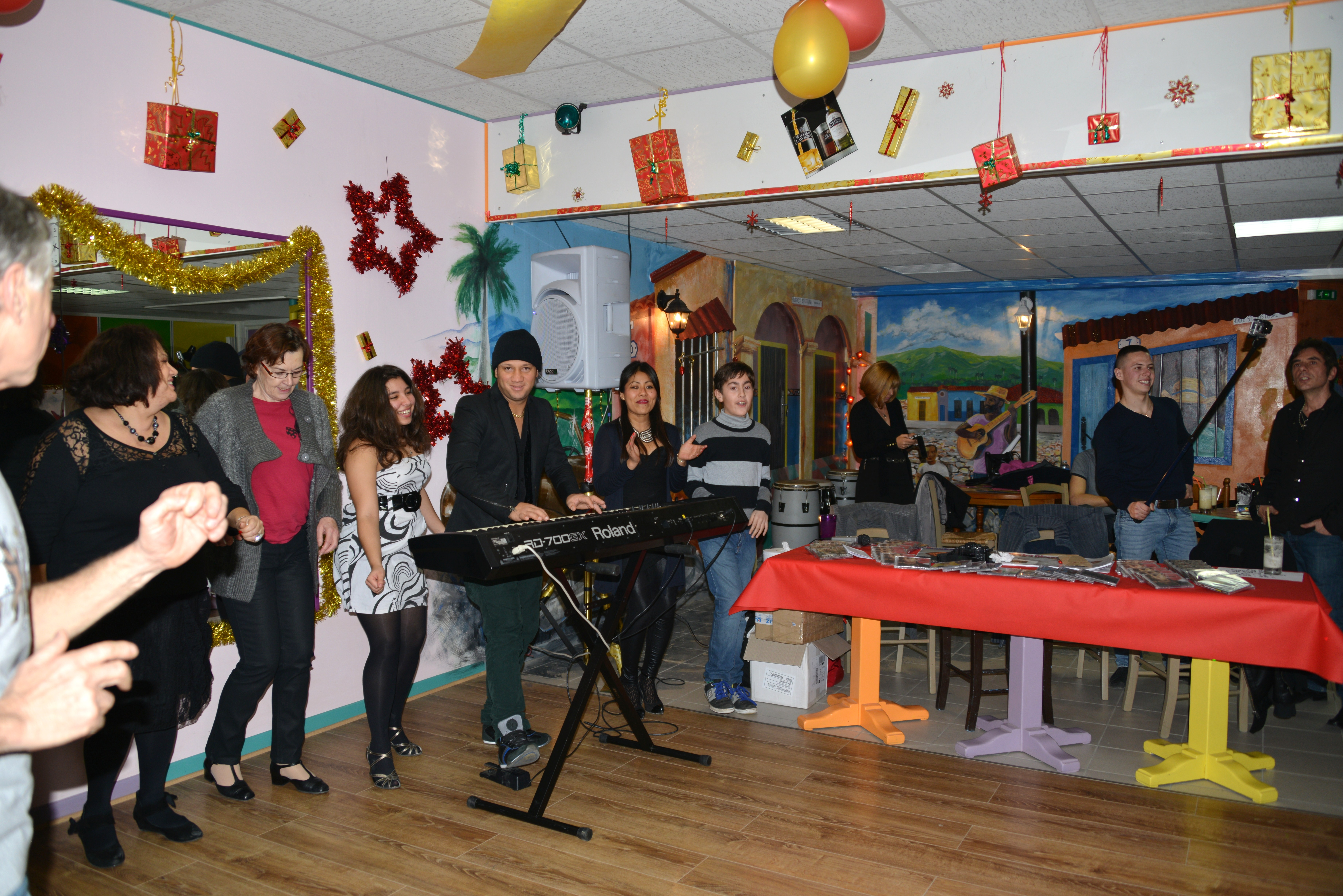 Maikel Blanco Cuevas au Cuba Tropicana à La Rochelle en janvier 2013. Maikel Blanco au clavier. Soirée dansante au Cuba Tropicana en l’ honneur de Maikel Blanco Cuevas (Maykel Blanco) venu en France pour la présentation de son nouvel album « A Toda Maquina » et la préparation de sa tournée de concerts en juillet 2013. Maikel Blanco est un auteur-compositeur cubain de timba. Le Cuba Tropicana est un établissement d’ enseignement des danses latines et un bar géré par Rey Martinez Piloto et Deborrah Fronteau. La Rochelle, Charente Maritime, France.